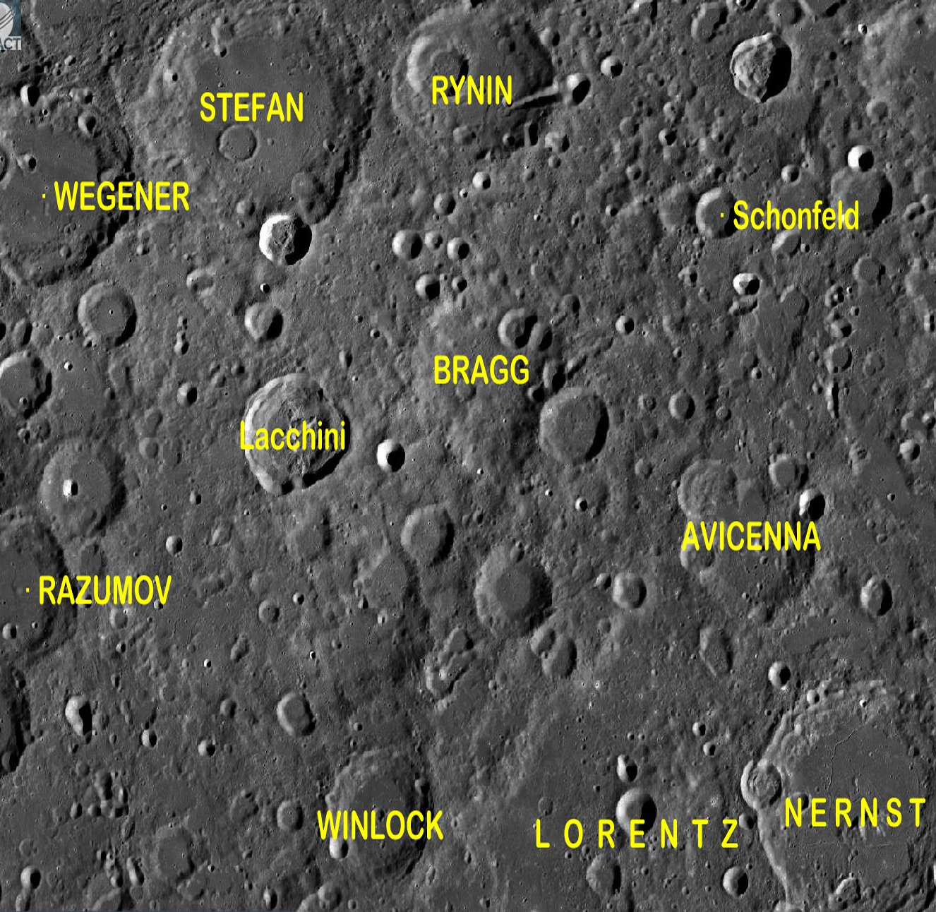 Cráter lunar Bragg. Localización. (Imagen LRO)